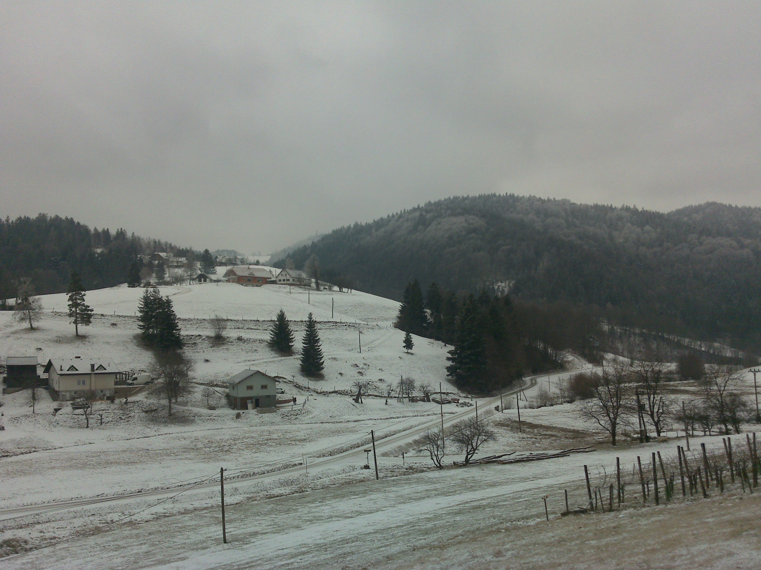 Gradišče - pogled proti Ostrem vrhu